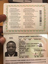 McHenryVenaani's